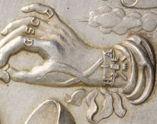 Taler, am Handgelenk H A und Nesselblatt, Daumen ohne P